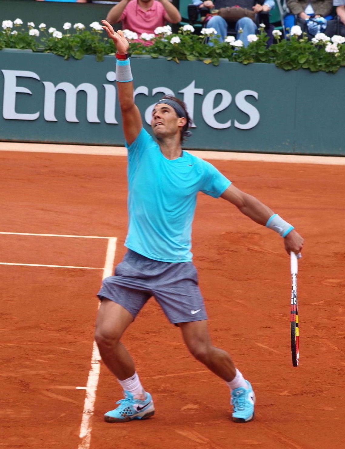 Internationaux de France de tennis, le 2 juin 2014, sur le court Philippe Chatrier : Raphaël Nadal